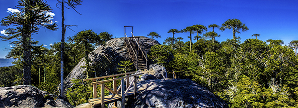 Fotografia Panoramica Piedra del Aguila Angol, Chile Novena Region